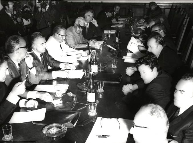 Prva sednica predstavništva SFRJ 1971. godine